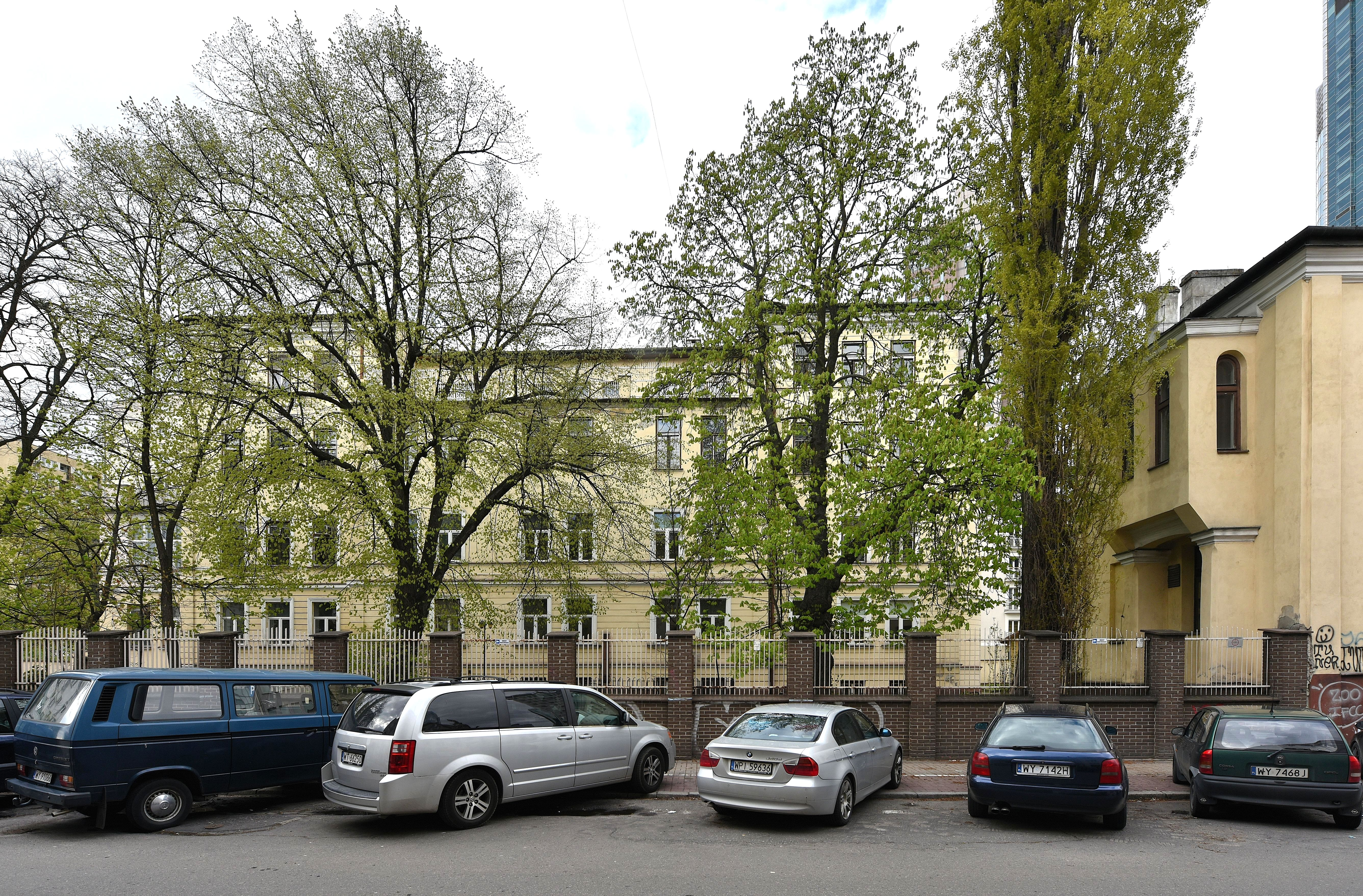 Szpital Dziecięcy Bersohnów i Baumanów w Warszawie od strony ul. Siennej